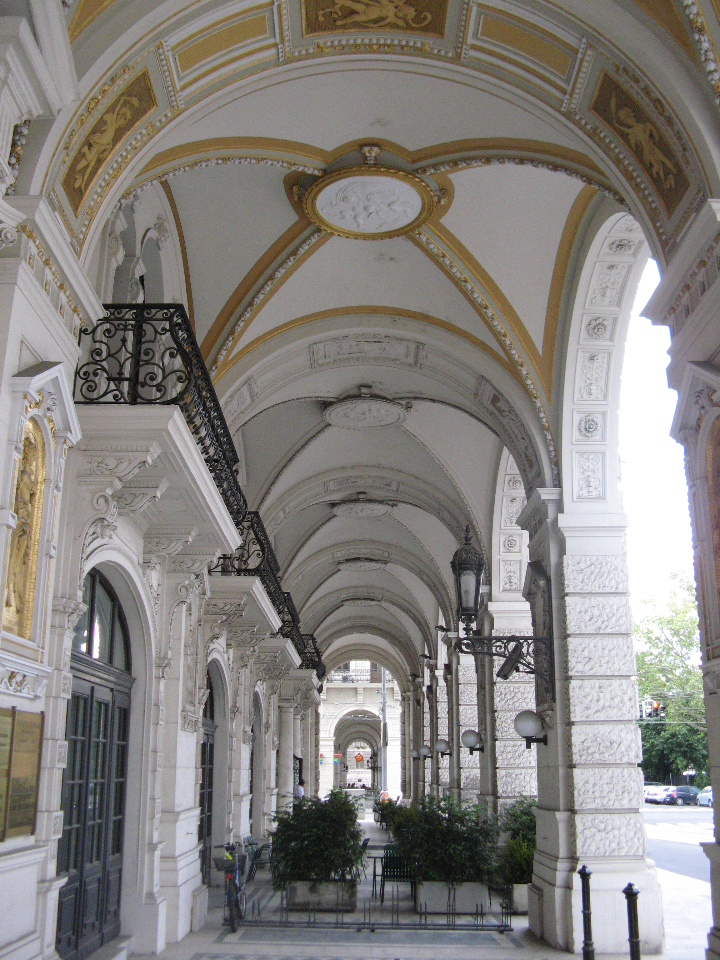 Arkaden, Reichsratsstraße 7-9, Wien-Innere Stadt